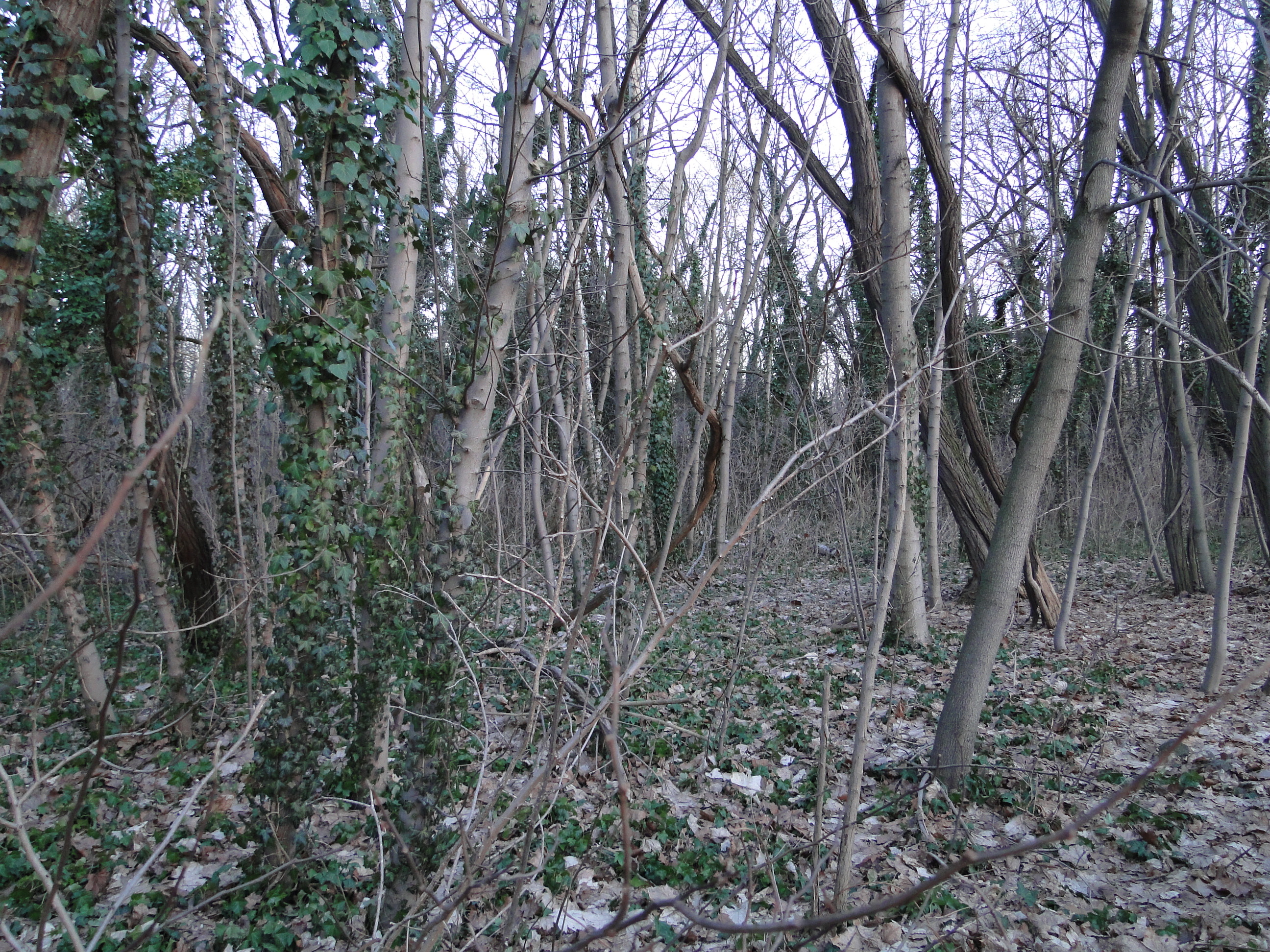 Radeburger Straße, Höhe Weinbergstraße, Heller, bewachsenes Gebiet des ehem. Lagers Hellerberg/Lager Kiesgrube von der Radeburger Str. aus gesehen